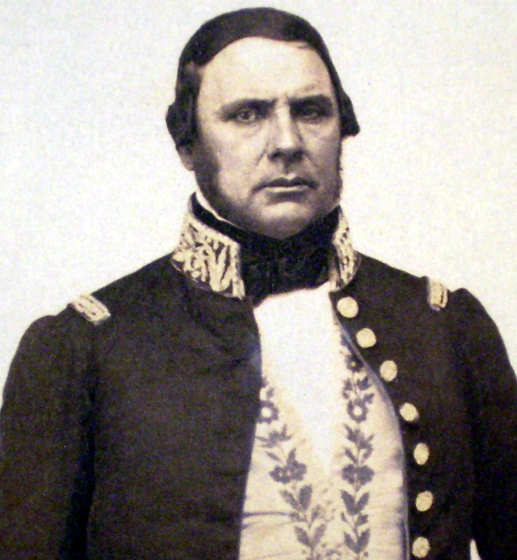 Parcial del daguerrotipo original de Justo José de Urquiza (1801-1870)